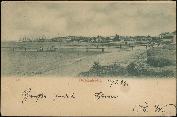 Дедеагач.